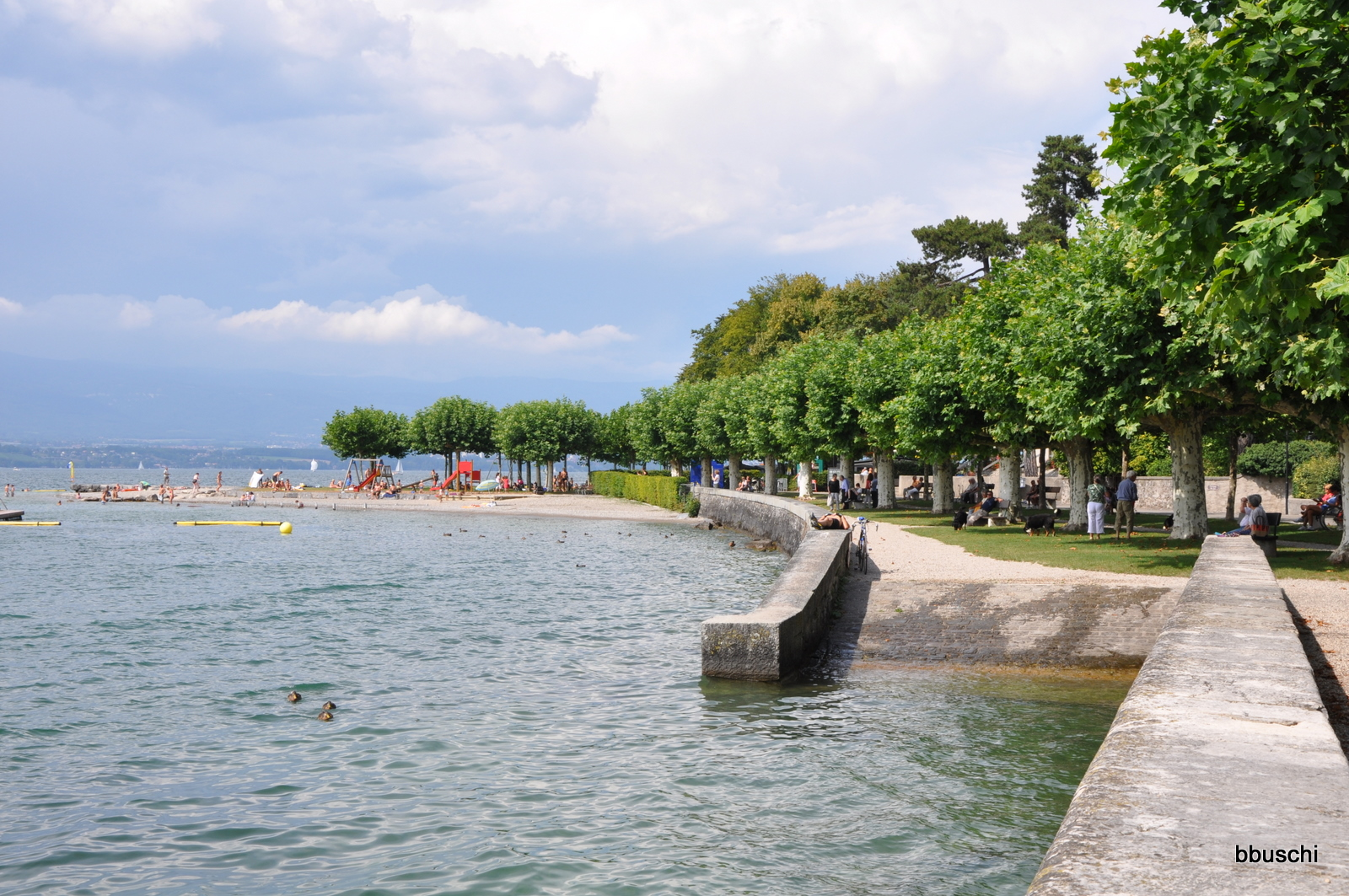 Suisse, Hermance, le Quai et la Plage